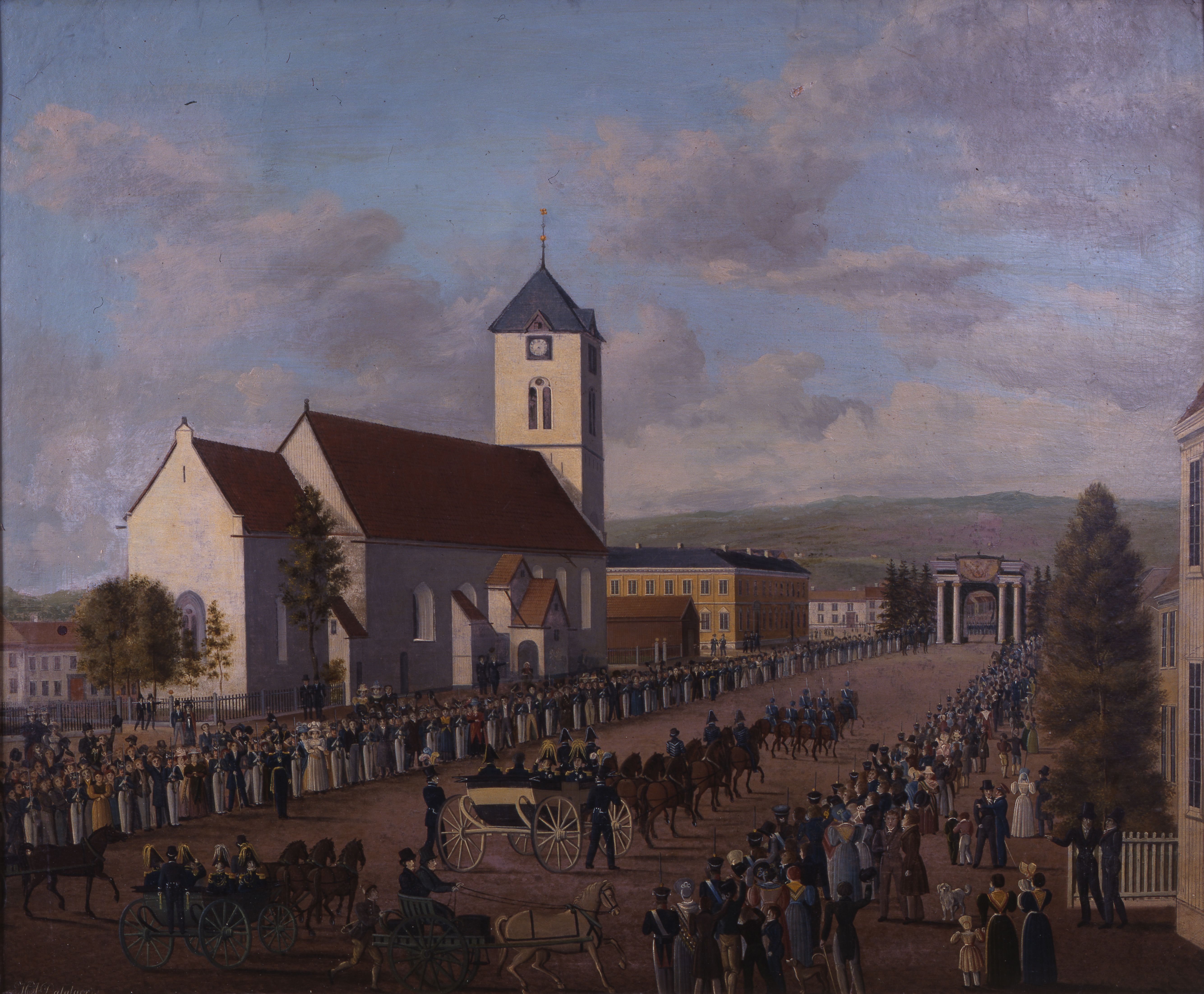 Format: Avfotografert maleri / Lysbilde. Dato / Date: 30 August 1835. Kunstner / Artist: Mathias Anton Dalager (1797-1837) Fotograf / Photographer: Jette Calløe Petersen. Sted / Place: Kongens gate, Trondheim. Eier / Owner Institution: Trondheim byarkiv, The Municipal Archives of Trondheim Arkivreferanse / Archive reference: Tor.H46.F23010 Merknad: Malt av Mathias Anton Dalager, se Dalagers signatur nederst i venstre hjørne. Gjengitt i boka til Kavli. Originalen hang i byavdelingen til Vitenskapsmuseet? Utstillingstekst i Trondhjems 900 Aars Jubilæum: Katalog for Den Historiske Udstilling i Trondhjem 1897, side 31: 195. Hs. Maj. Kong Carl Johans Indtog i Trondhjem 31 August 1835. OM., sign. M. A. Dalalger [!]. Forestiller Indtoget, der forøvrigt foregik Kl. BV2 Aften, gjennem Kongens Gade, forbi Frue Kirke og Hornemansgaarden. I Baggrunden Æreporten, hvor Kongen steg af Vognen, og hvorfra han tilfods gik til Stiftsgaarden. *Grosserer Henrik Spørck. Til dette Maleri fandtes en Pendant, forestillende Kongen stigende af Vognen i Æreporten, ogsaa malet af Dalager; det er imidlertid brændt i 1880 Aarene. Kongen kom denne Gang til Trondhjem over Jemtland og Værdalen.